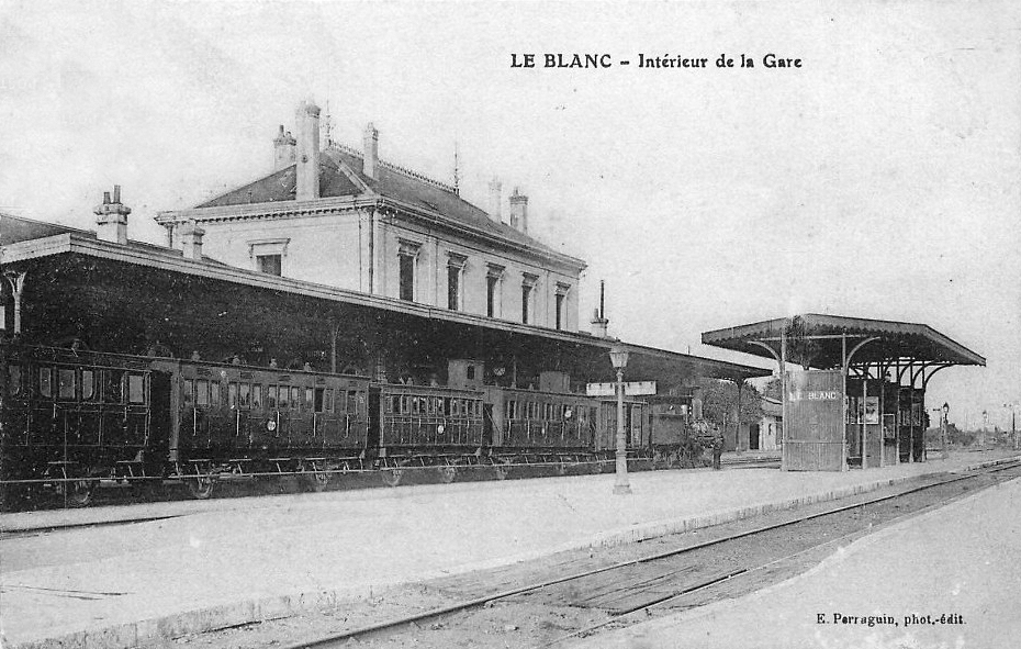 Intérieur de la gare du Blanc vers 1900 et desserte par un train de voyageurs.